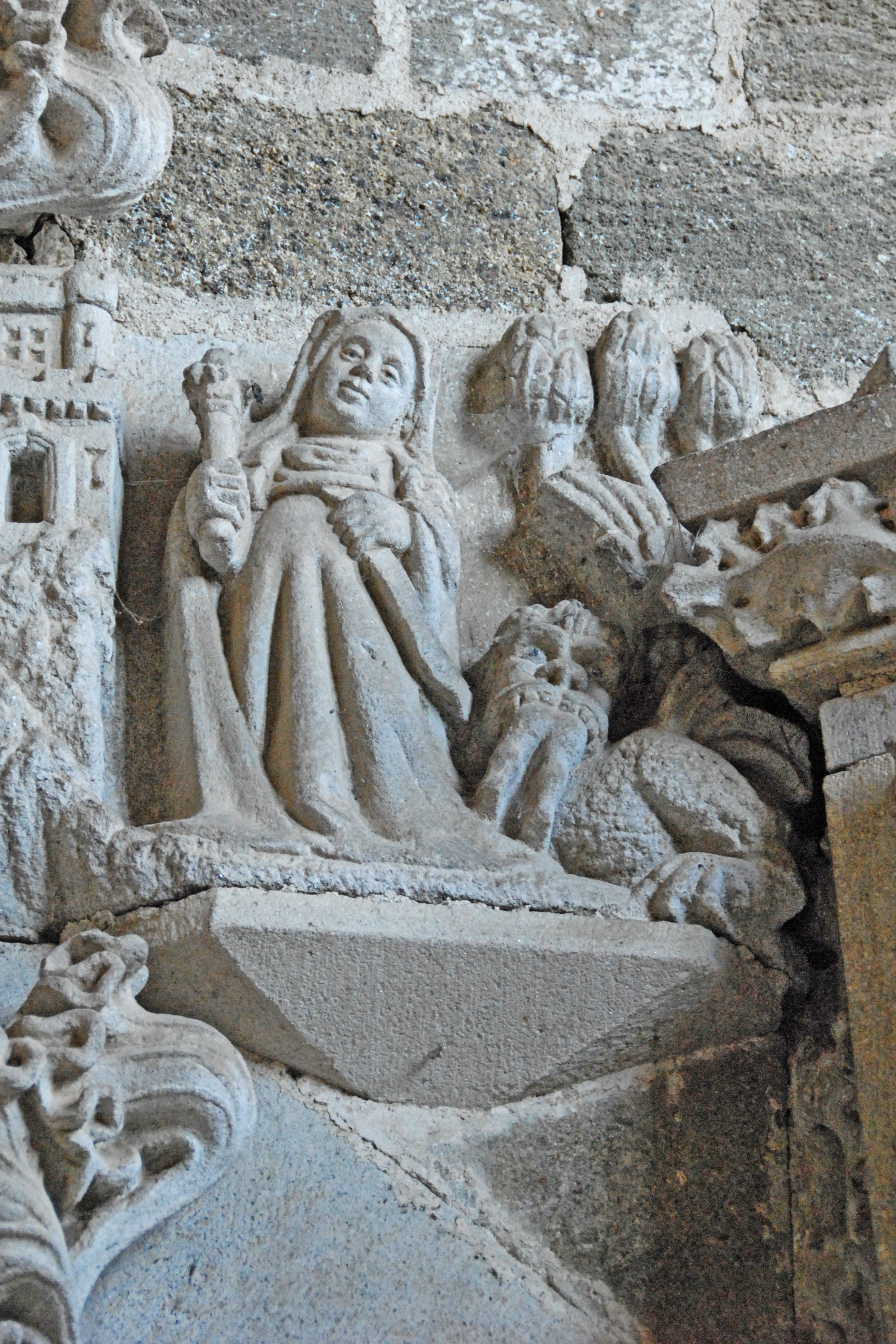 Chanteuges, Chapelle St.-Anne, Relief Ste.-Marthe mit Tarasque